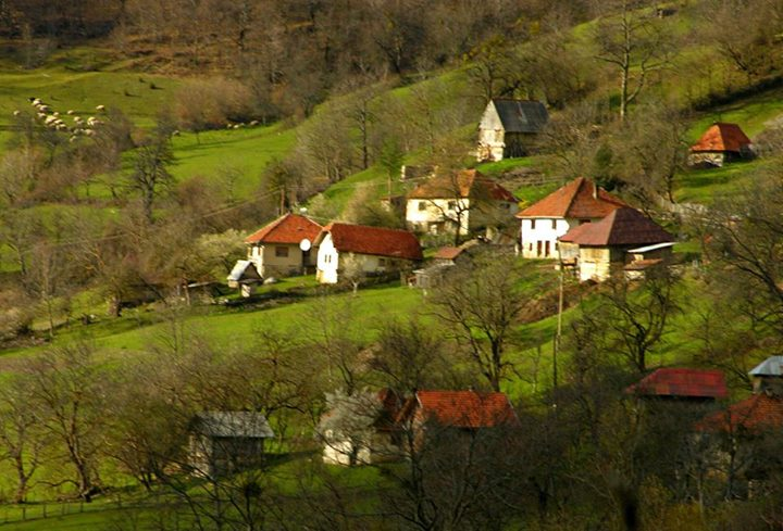 Srpski (latinica): Selo Mazoče pripada teritoriji opštine Foča